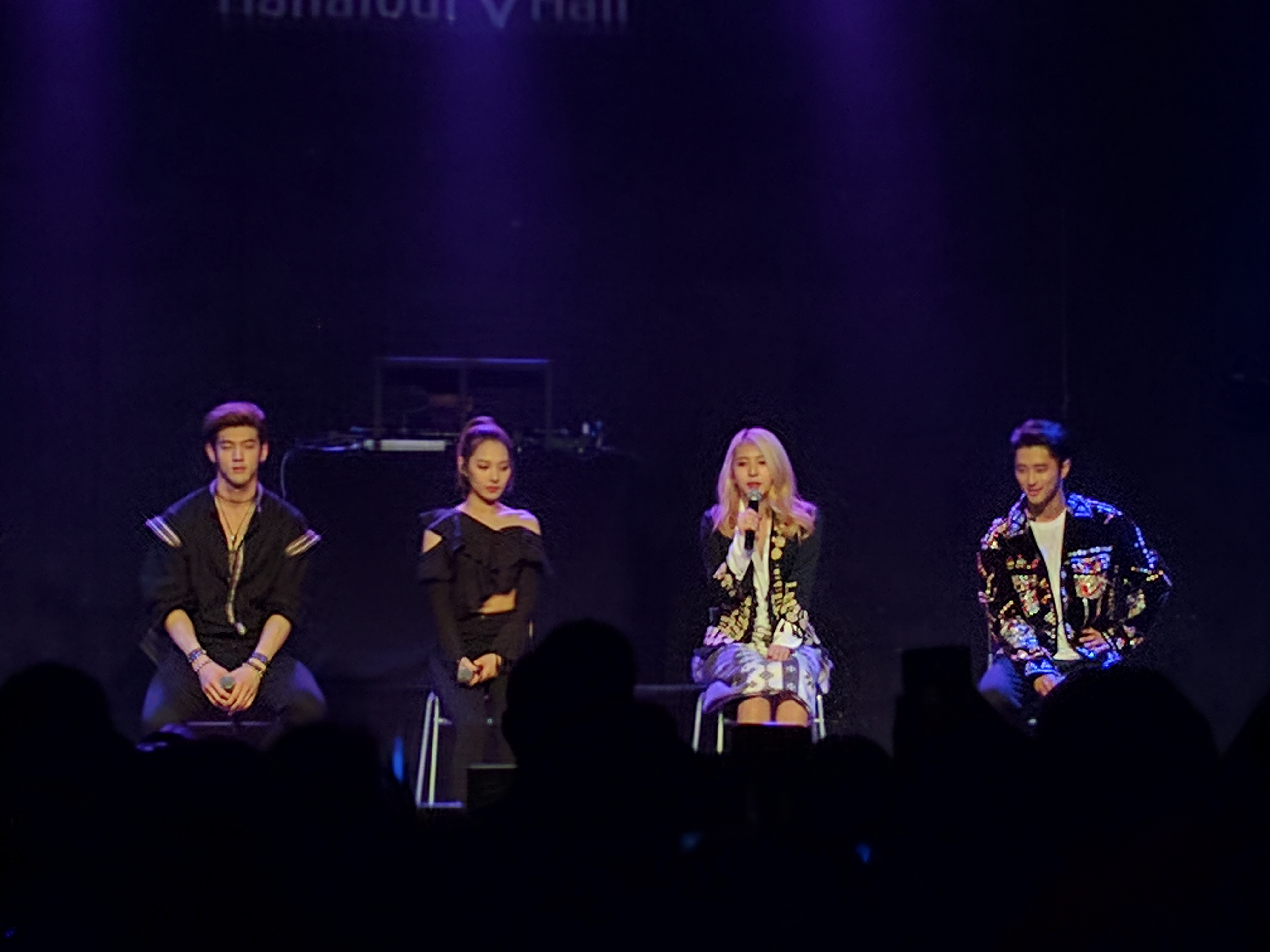 2017년 4월 25일 와일드 카드 파티에서 K.A.R.D